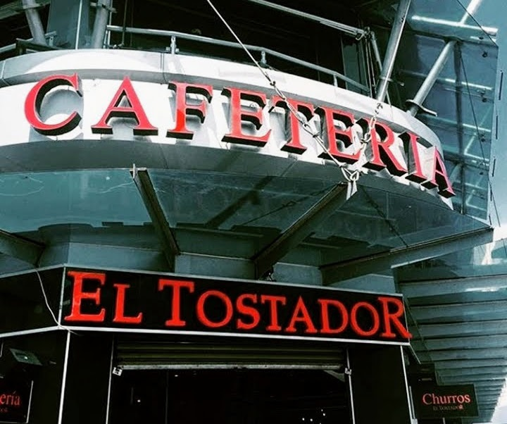 Cafetería El Tostador de San José fundada en la década de los 40. Avenida Central, calles 10 y 12.